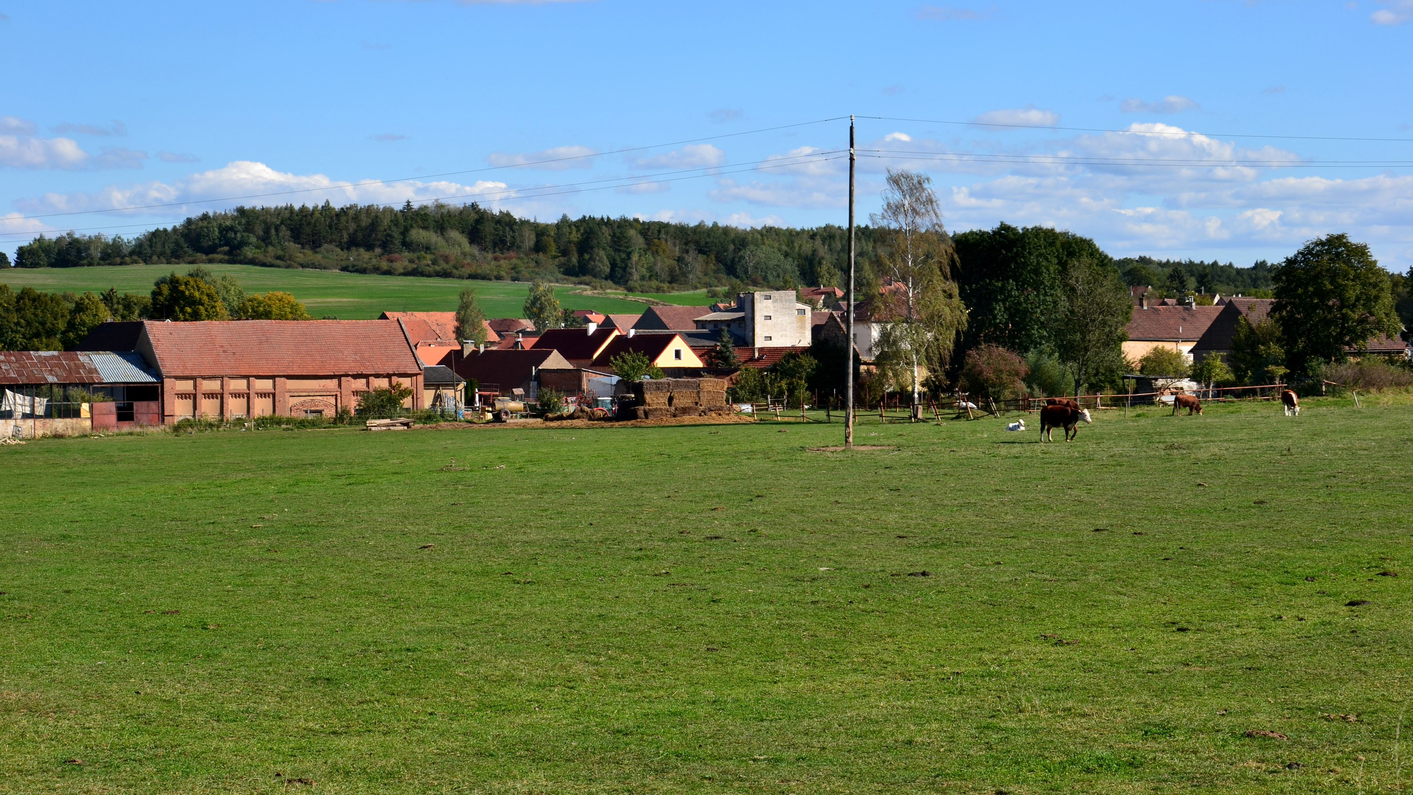 Jihozápadní část vesnice